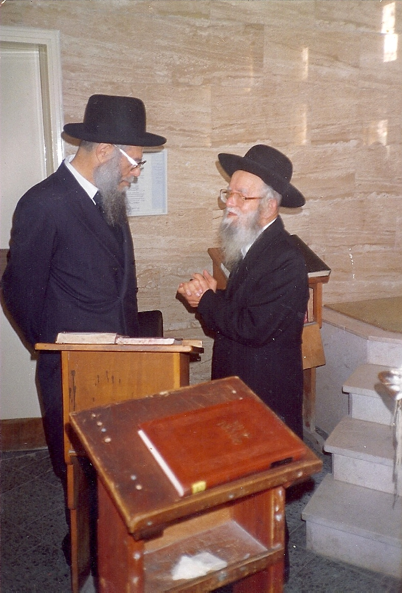 הרב ראובן יוסף גרשנוביץ והרב יששכר מאיר בהיכל ישיבת 'הנגב' בנתיבות